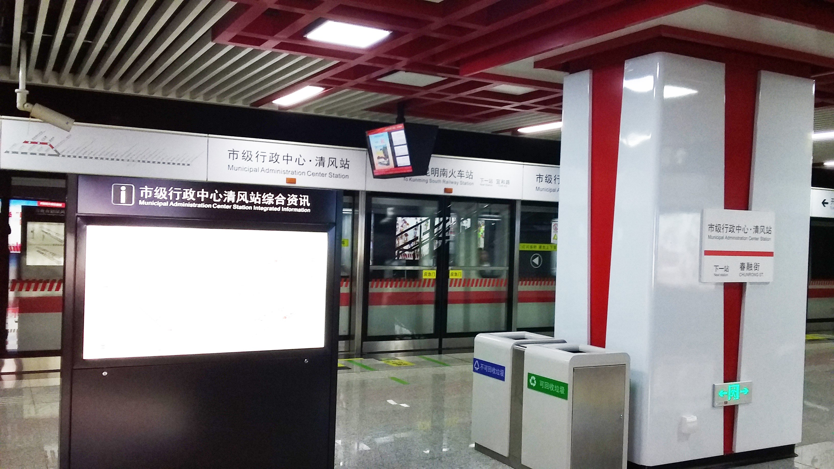 昆明地铁1号线支线，市级行政中心·清风站。